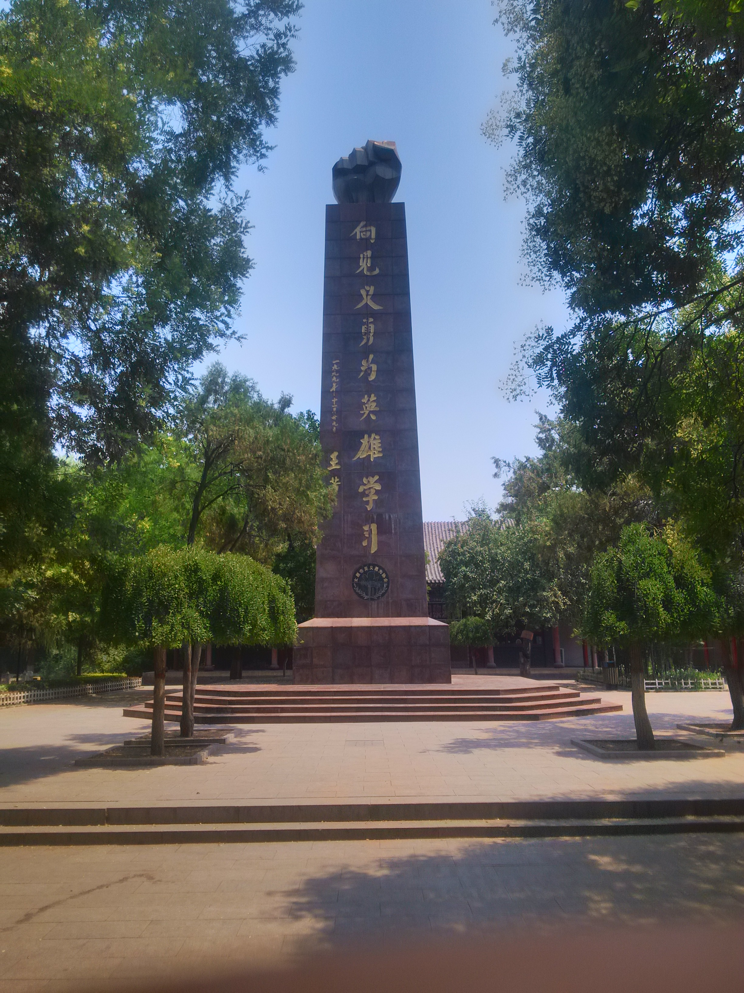 中文（中国大陆）: 太原市见义勇为纪念碑。摄于文瀛公园。